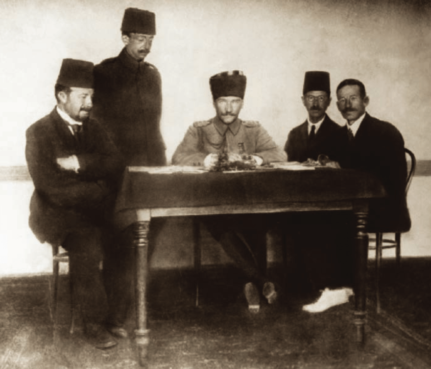 Erzurum Kongresi için hazırlıklar yapılırken, Mustafa Kemal Paşa Erzurum’da, 5 Temmuz 1919. Soldan sağa: Münir Akkaya, Refik Saydam, Mustafa Kemal Atatürk, Süreyya Yiğit, Mazhar Müfit Kansu.